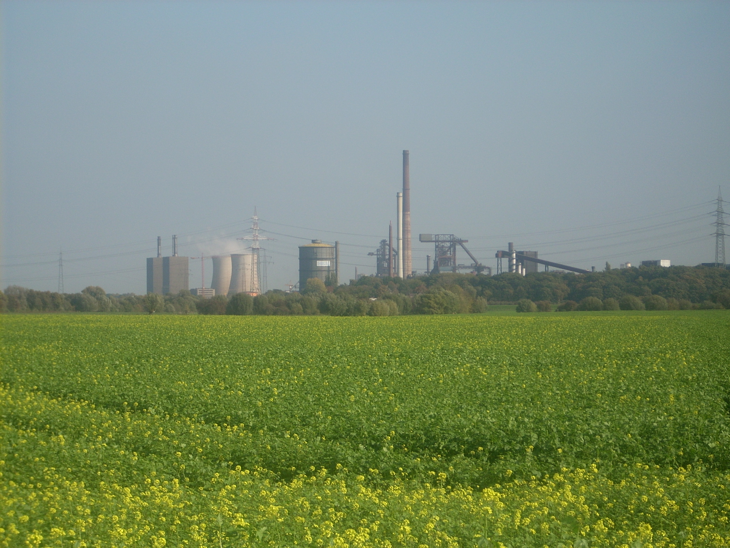 Hüttenwerke- Krupp Mannesmann in Duisburg, Blick von Duisburg-Mündelheim, im Vordergrund sind die Rheinauen, die teilweise Landwirtschaftlich genutzt werden (hier: Rapsanbau)